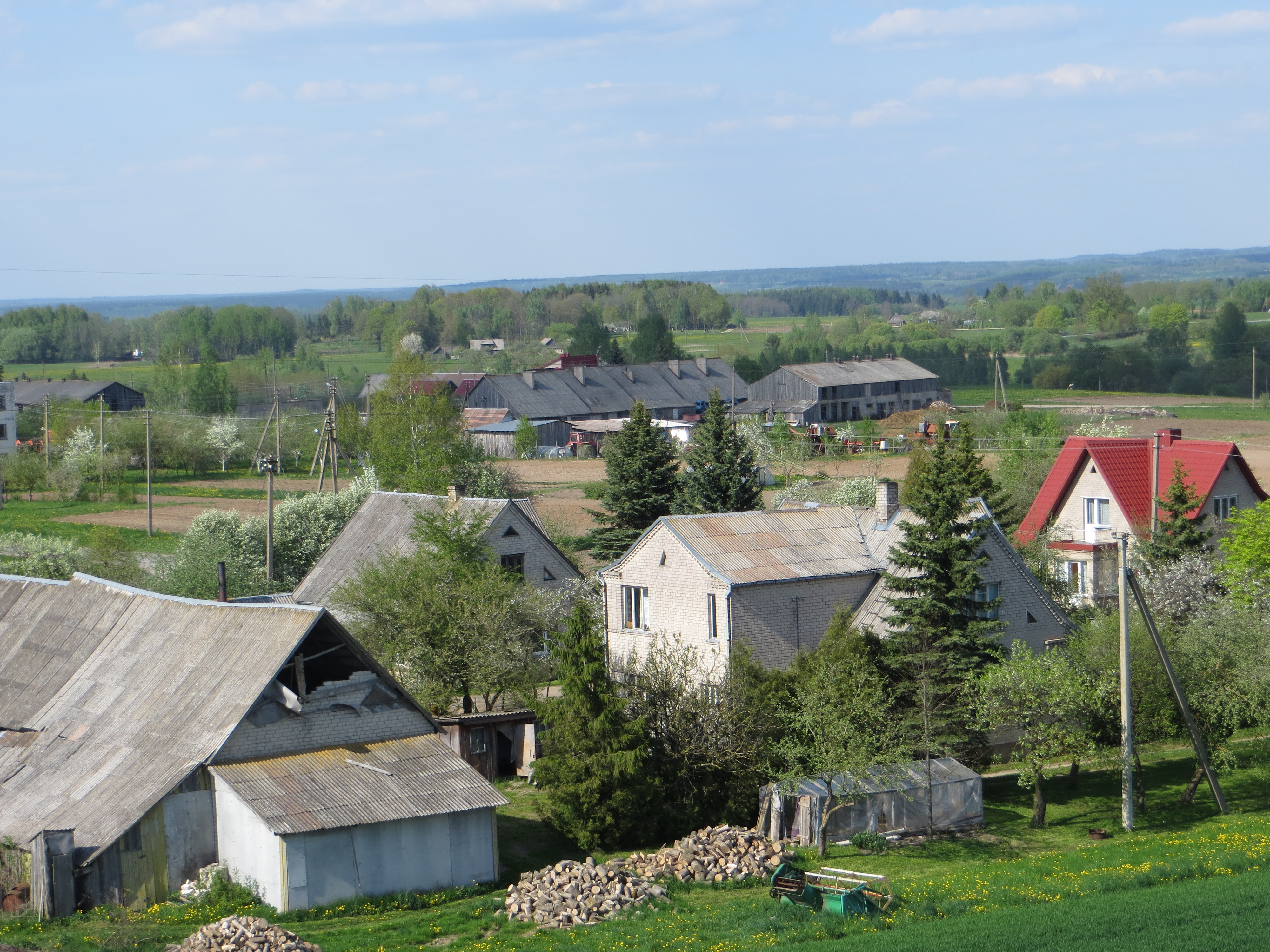 Staškūniškis 29241, Lithuania